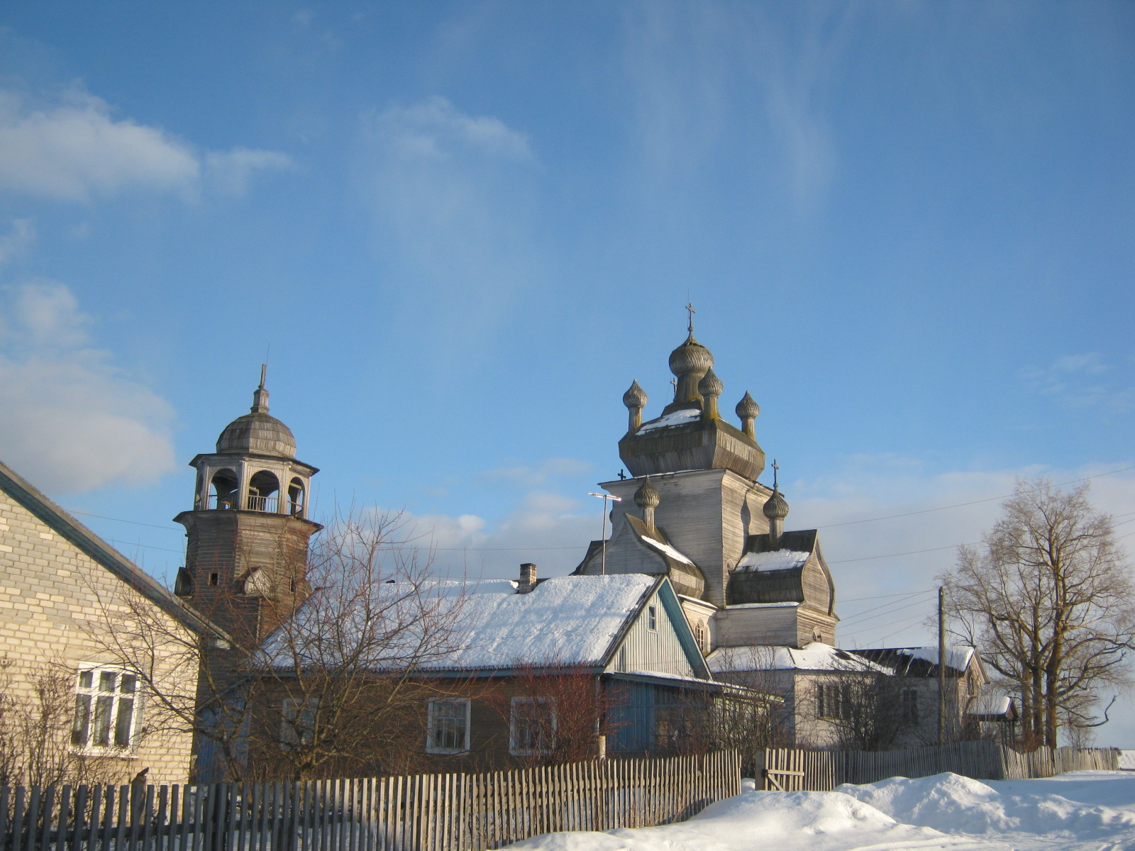 Погост Турчасовский — комплекс деревянных церквей (Архангельская область, Онега, село Турчасово)